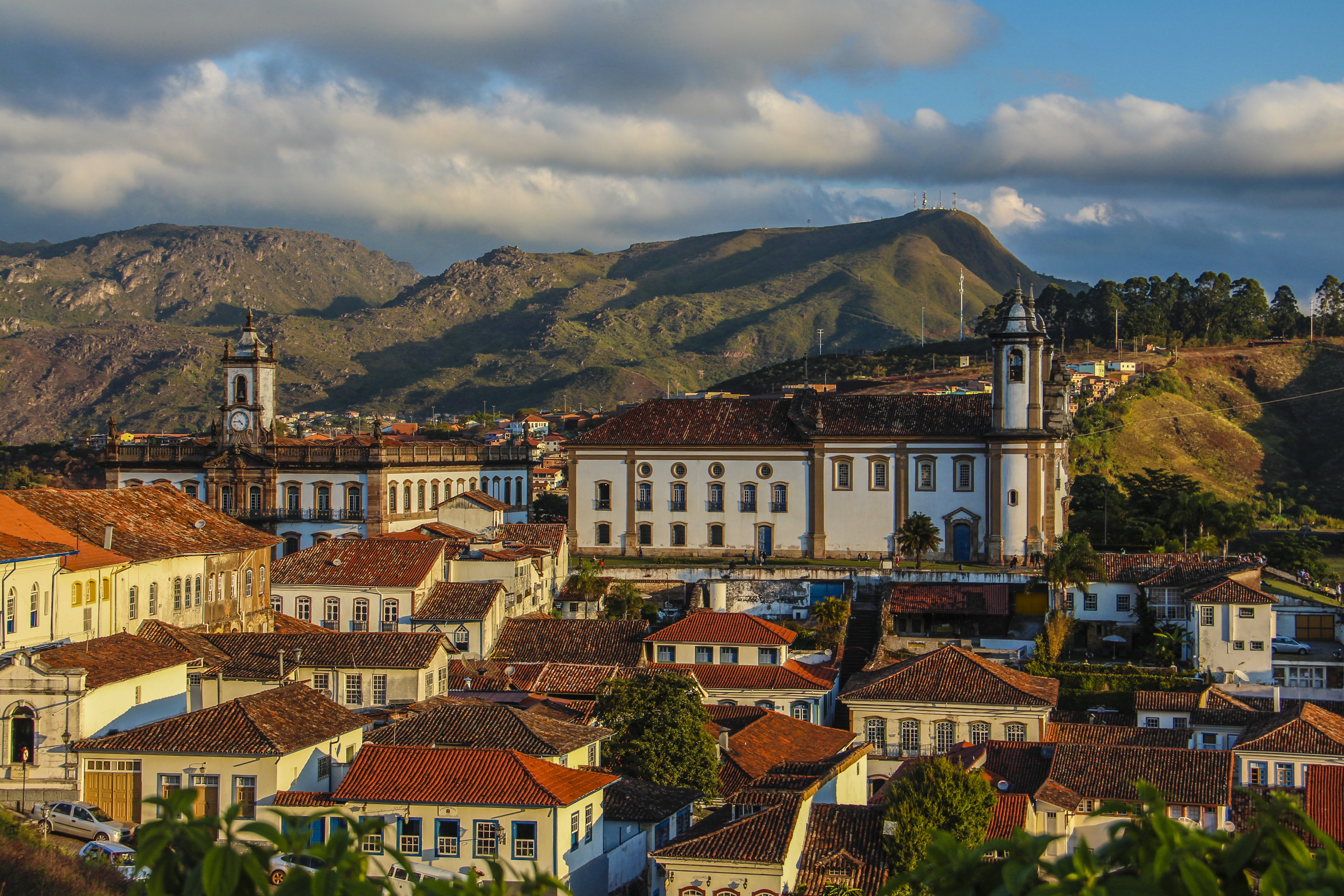 Ouro Preto, MG: conjunto arquitetônico e urbanístico